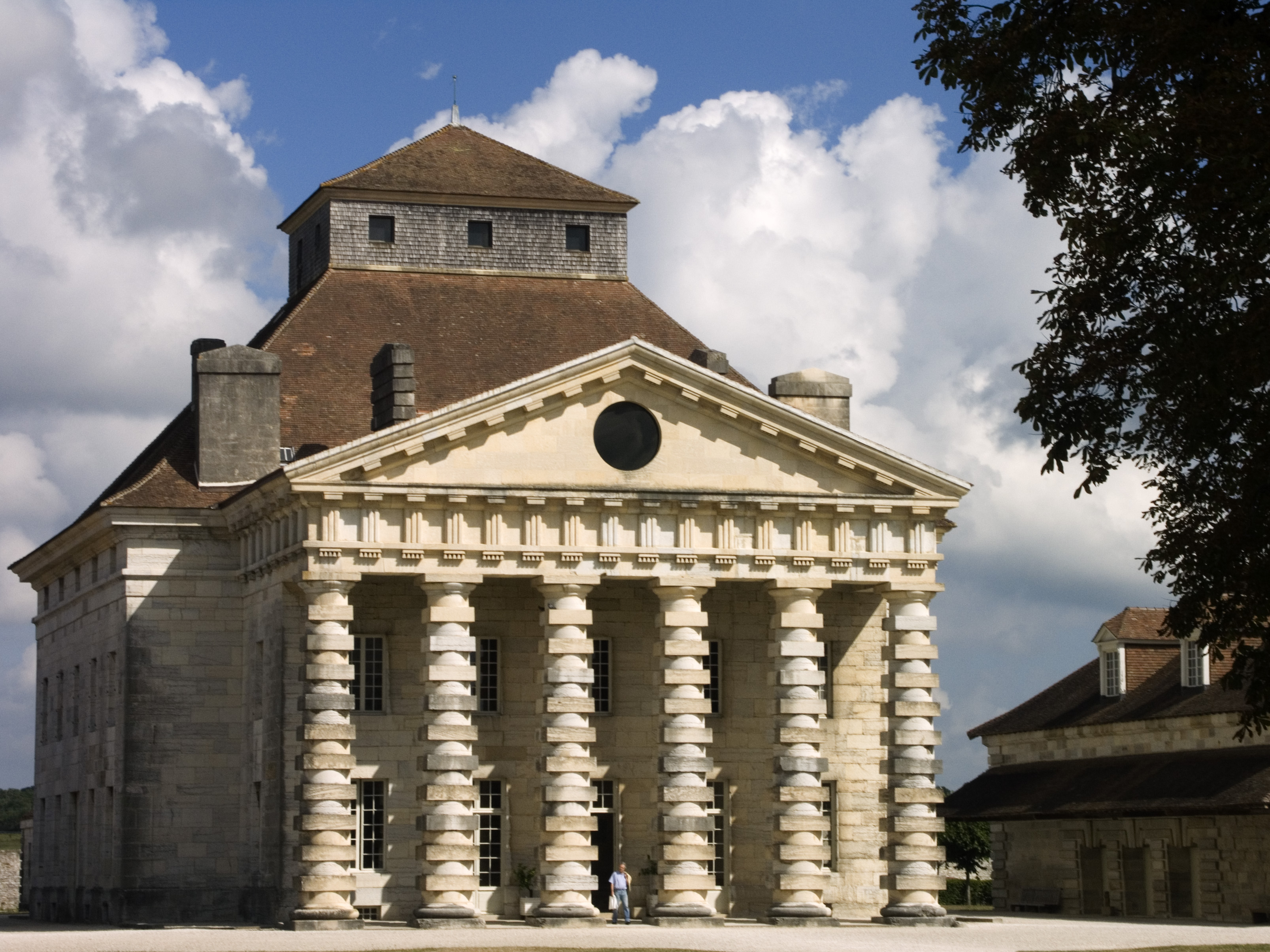 Maison du directeur des Salines Royales d'Arc et Senan